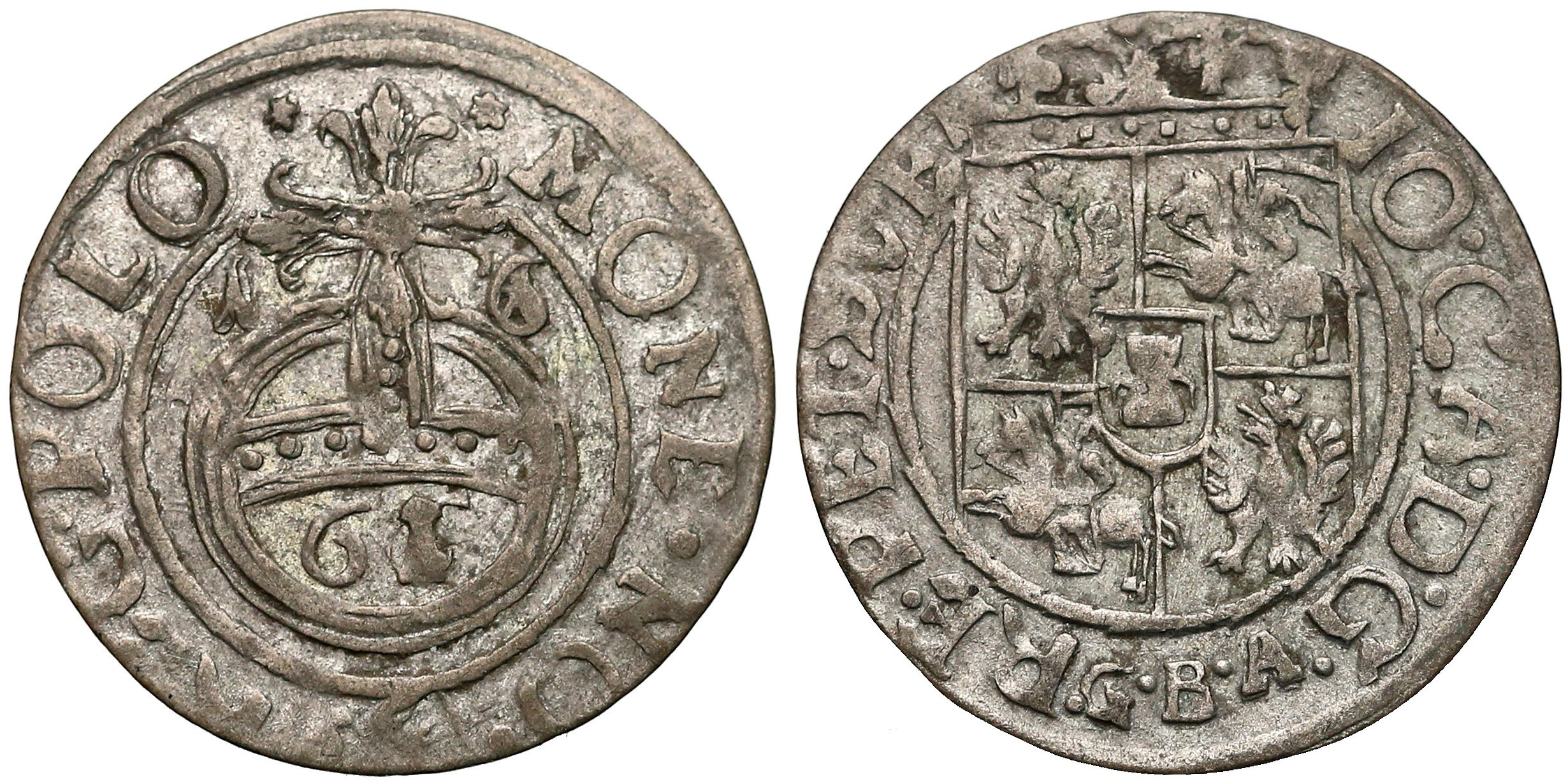 Półtorak koronny 1661 Lwów